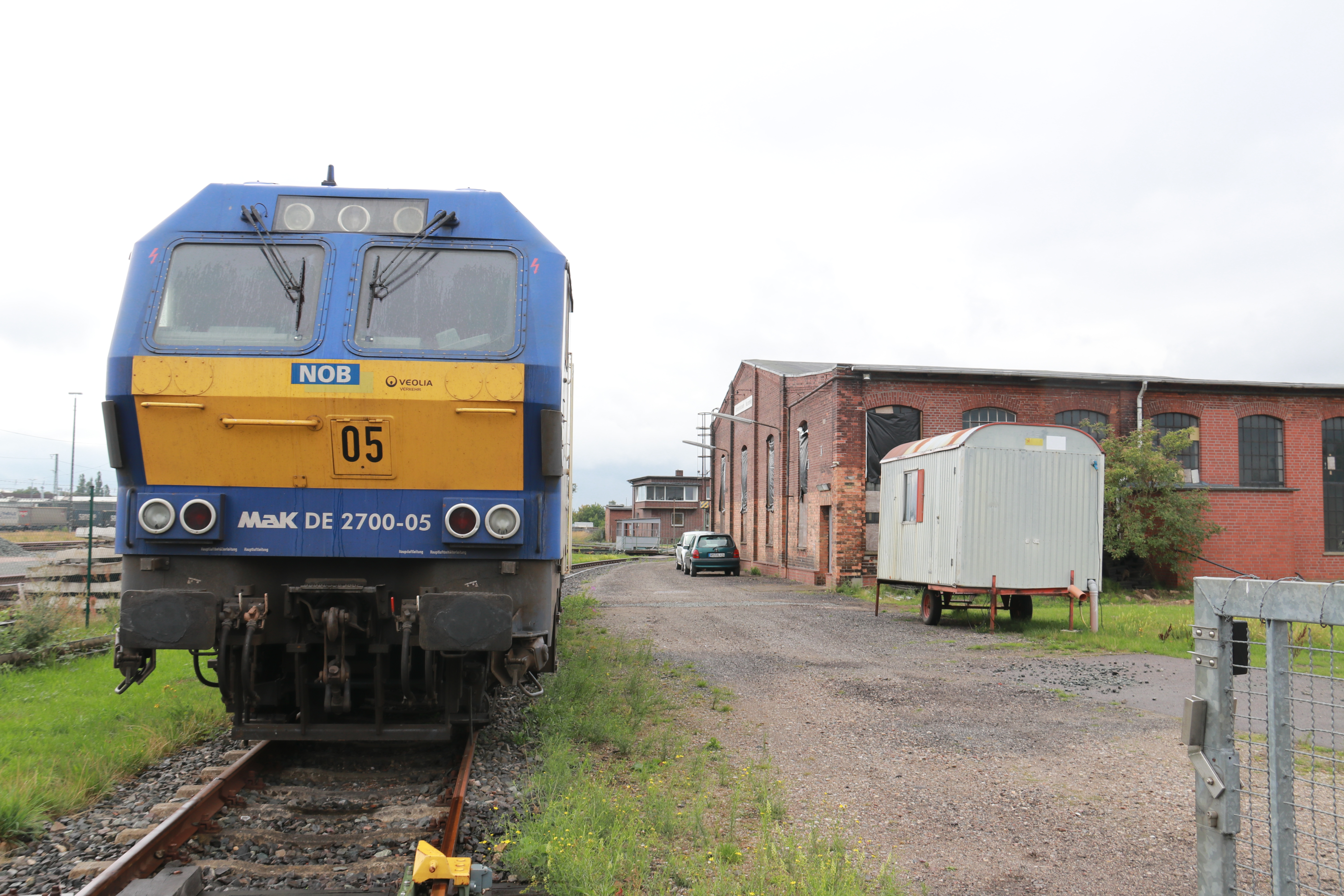 Bahnbetriebswerk Neumünster - Lokschuppen mit DE 2700-05